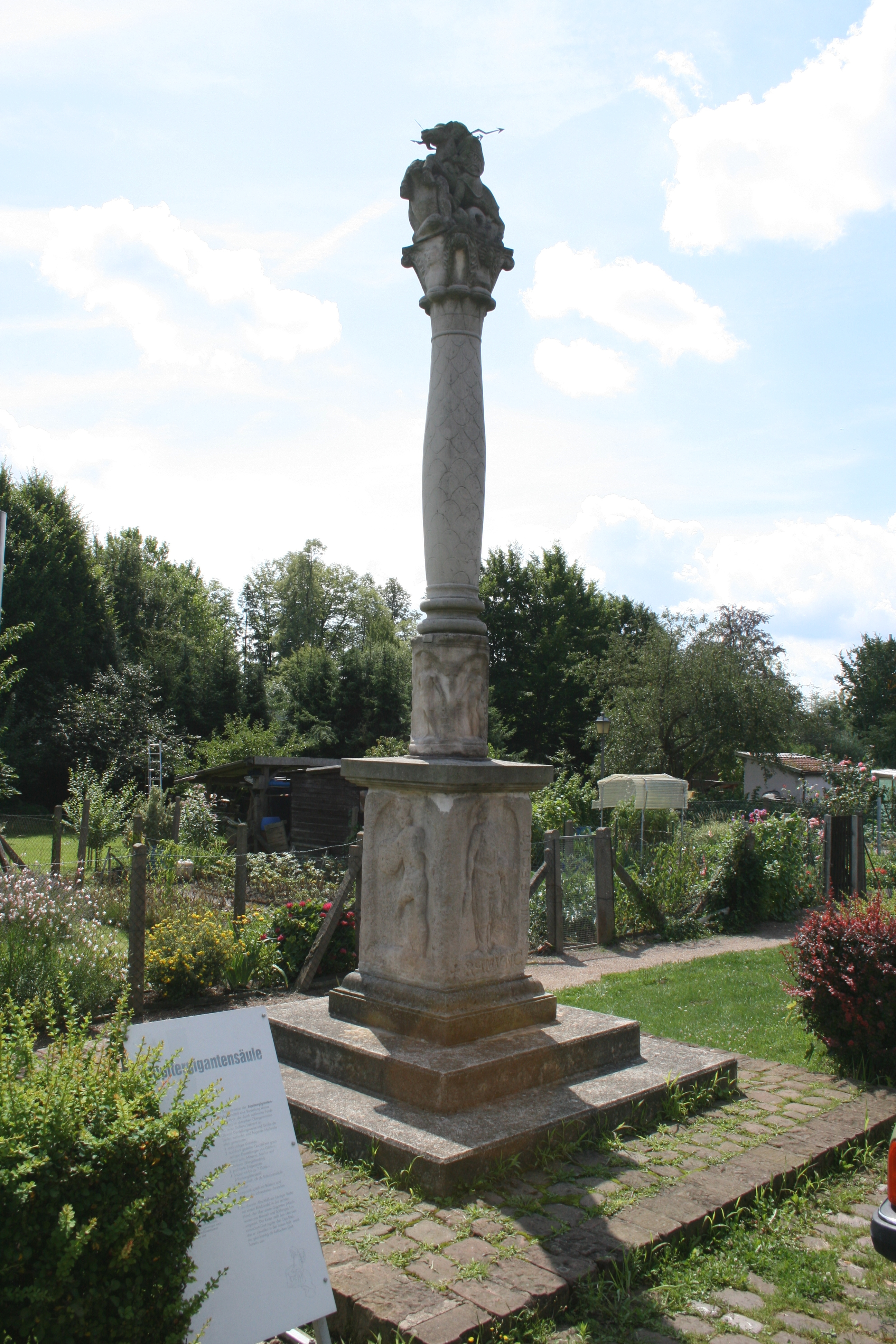 Römermuseum Obernburg, rekonstruierte Jupitergigantensäule vor dem Museum.